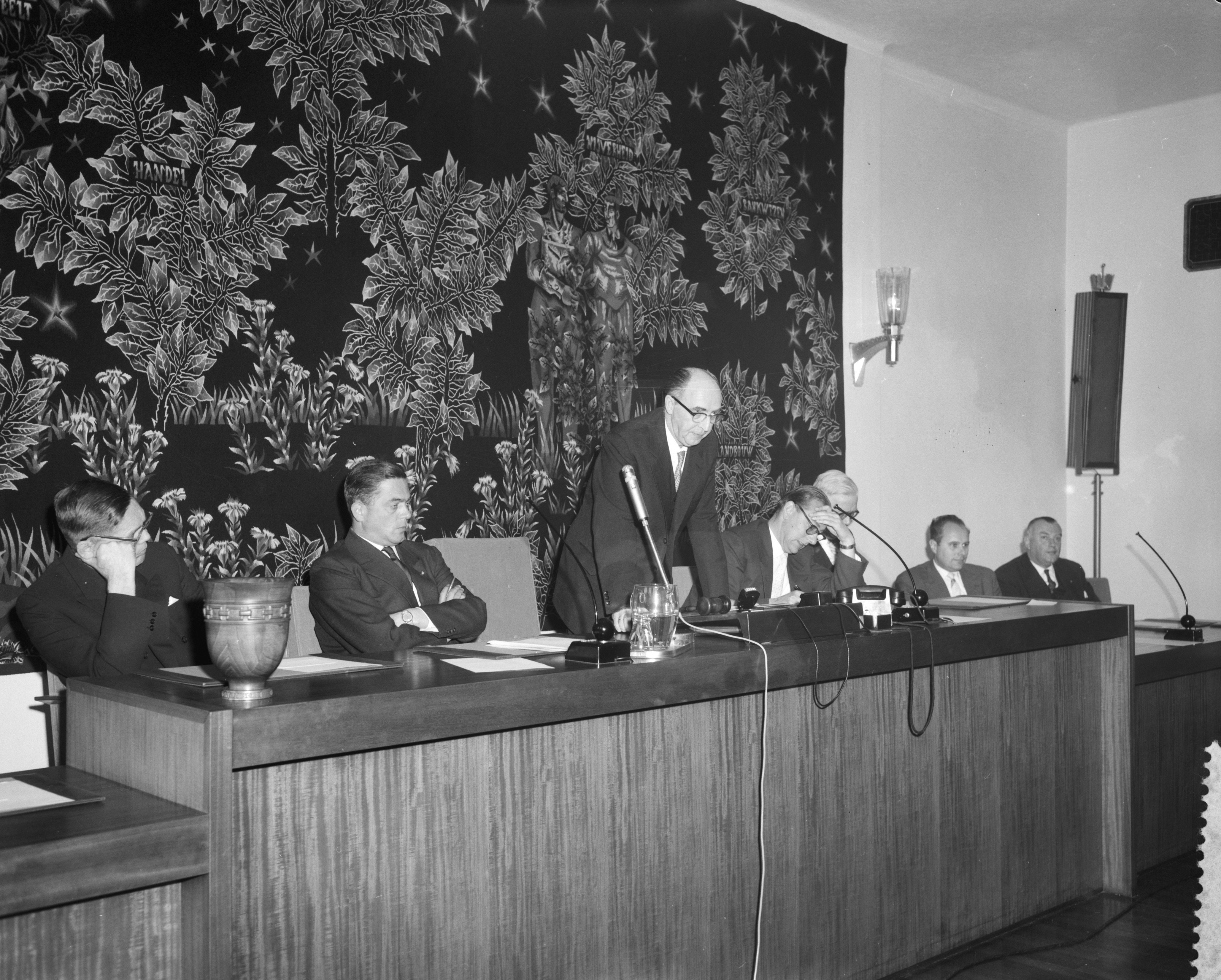 Collectie / Archief : Fotocollectie Anefo Reportage / Serie : [ onbekend ] Beschrijving : Officiele installatie van het produktiviteitscentrum van visbedrijf door Minister V. G. M. Marijnen te Den Haag toespraak door de voorzitter prof. dr. J. F. Haccou Datum : 11 november 1959 Locatie : Den Haag, Zuid-Holland Trefwoorden : Installatie, produktiviteitscentra, toespraken, voorzitters Persoonsnaam : Marijnen, Victor, Prof. Dr. J. F. Haccou Fotograaf : Behrens, Herbert / Anefo Auteursrechthebbende : Nationaal Archief Materiaalsoort : Negatief (zwart/wit) Nummer archiefinventaris : bekijk toegang 2.24.01.04 Bestanddeelnummer : 910-8122